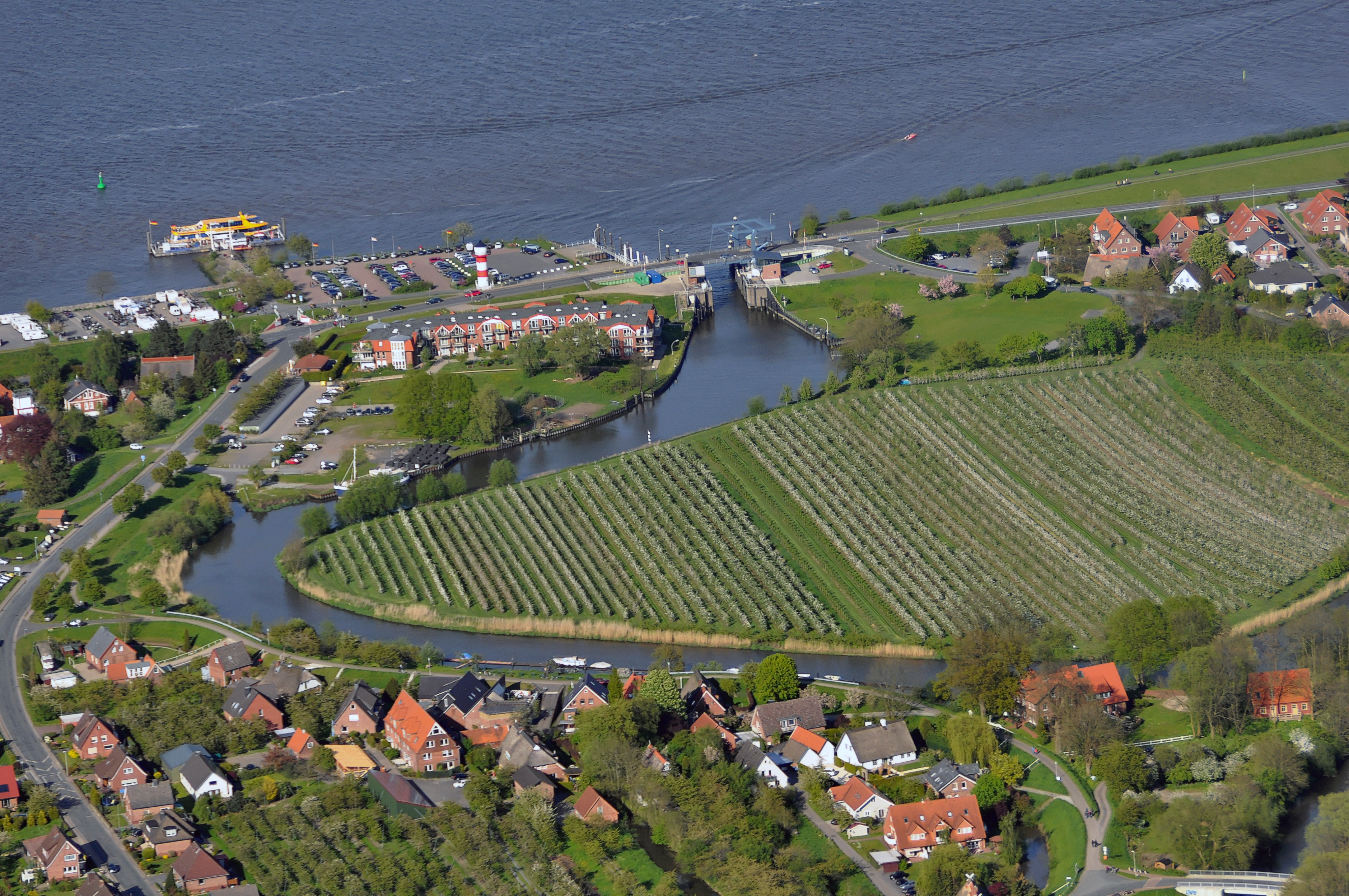 Luftbilder von der Nordseeküste 2012-05